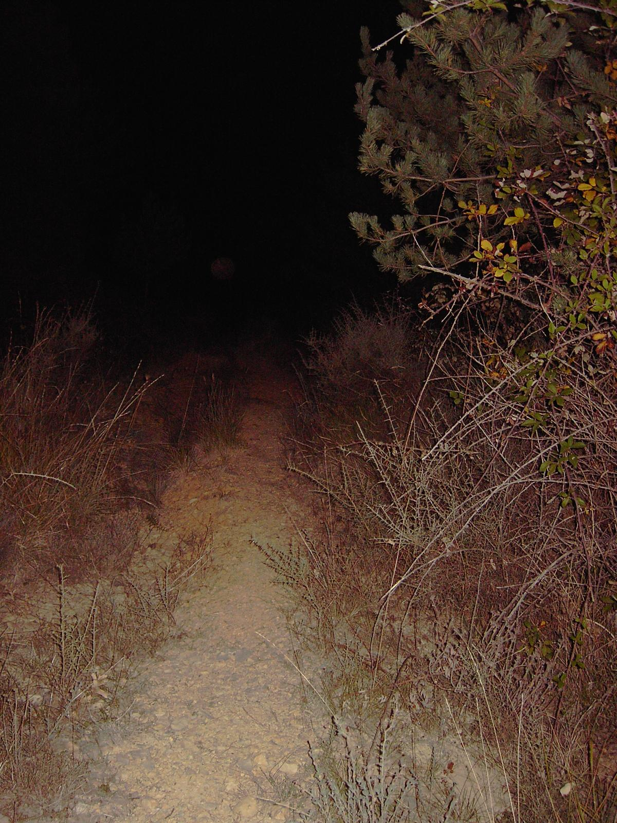 La vieja pista de Silves con la noche ya caida. "Cantando as bruixas se n'irán" que cantaba La Ronda.